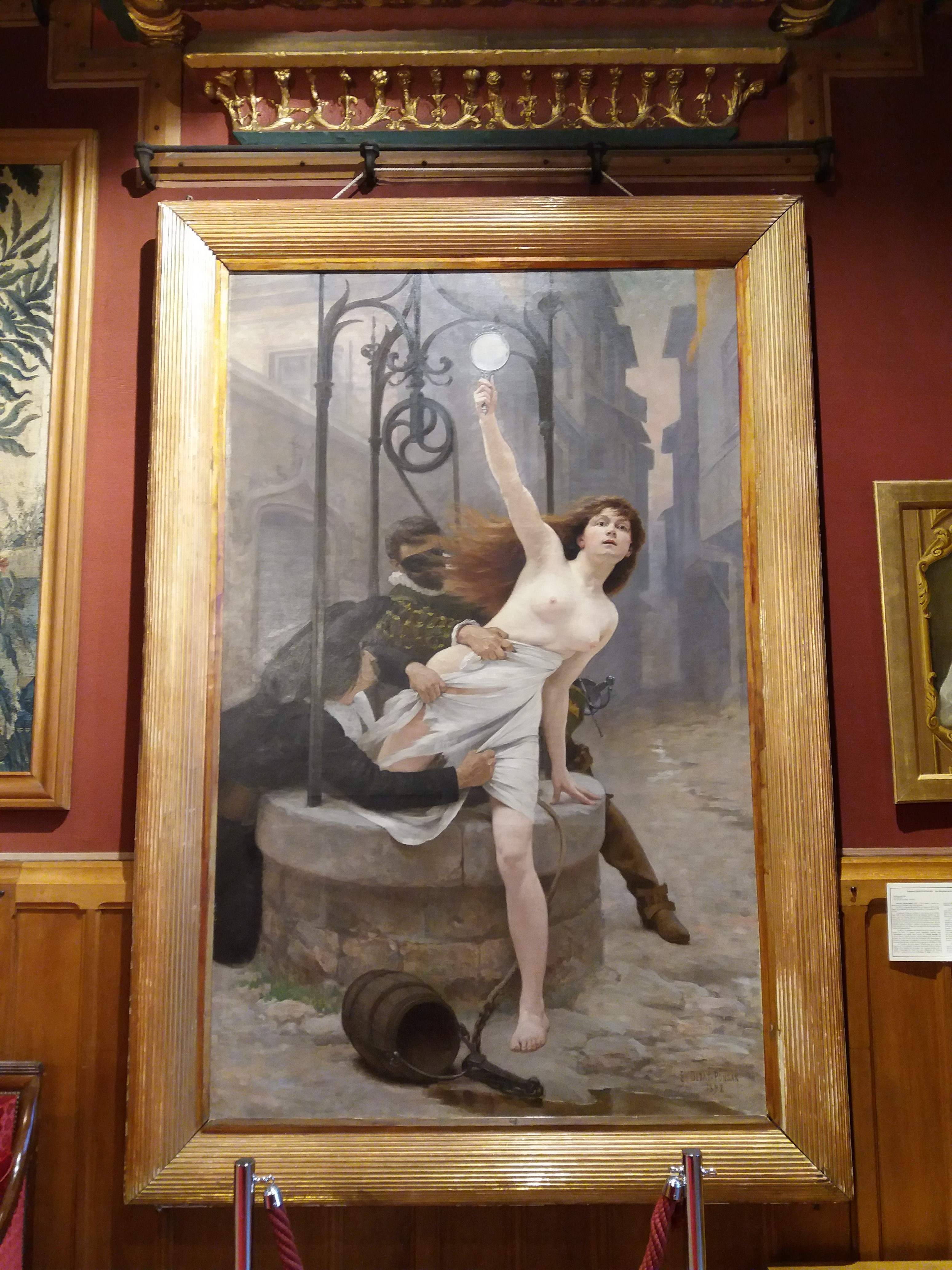 La Vérité sortant du Puits, E. Debat-Ponsan, 1898 Oeuvre politique puisqu'elle intervient en pleine affaire Dreyfus. Edouard Debat-Ponsan prend position en faveur du militaire, rompant par là ses liens avec sa famille antidreyfusarde.